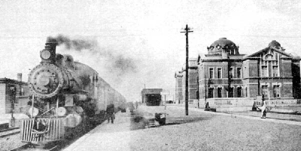 中文（中国大陆）: 从奉天站始发的火车